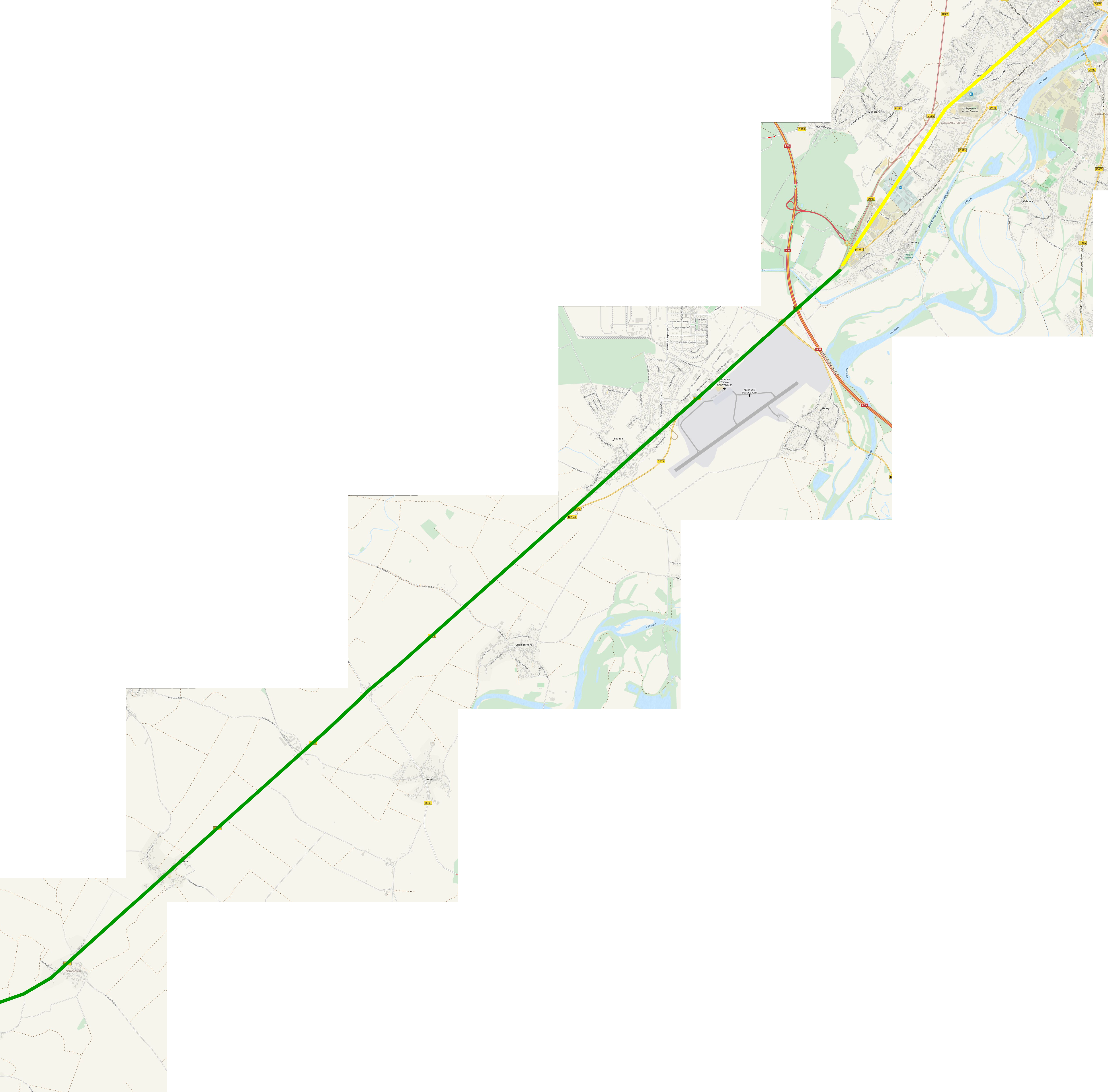 Detailkarte der Römerstrasse von Chalon-sur-Saône nach Besançon - Teilstück Beauchemin bis Dole (gelb: genaue Straßenführung unbekannt) Carte de détail de la voie romaine de Chalon-sur-Saône à Besançon - Partie de Beauchemin à Dole (jaune: tracé exact inconnu) This map may be incomplete, and may contain errors. Don't rely solely on it for navigation.